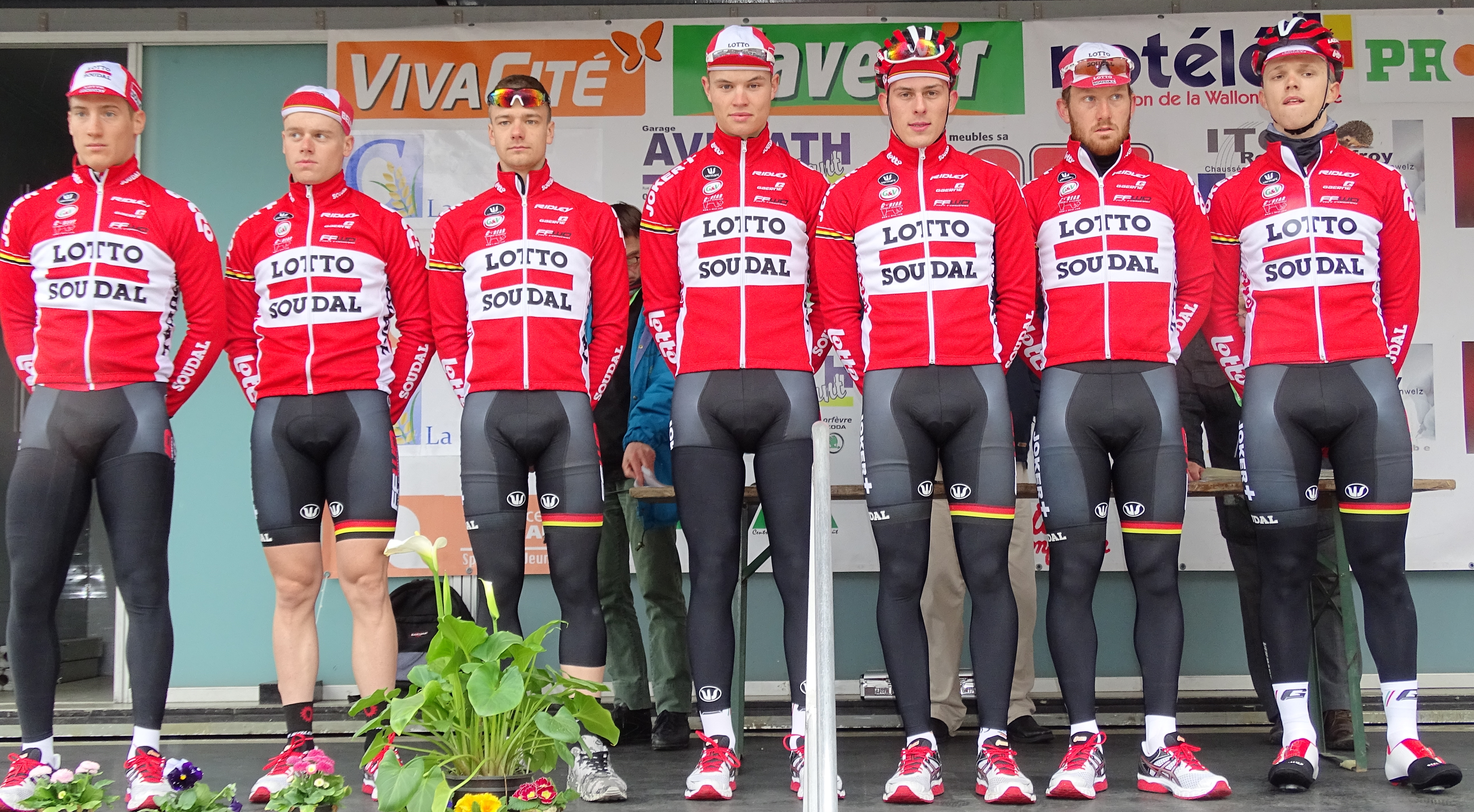 Triptyque des Monts et Châteaux 2015 Depicted team: Lotto-Soudal U23